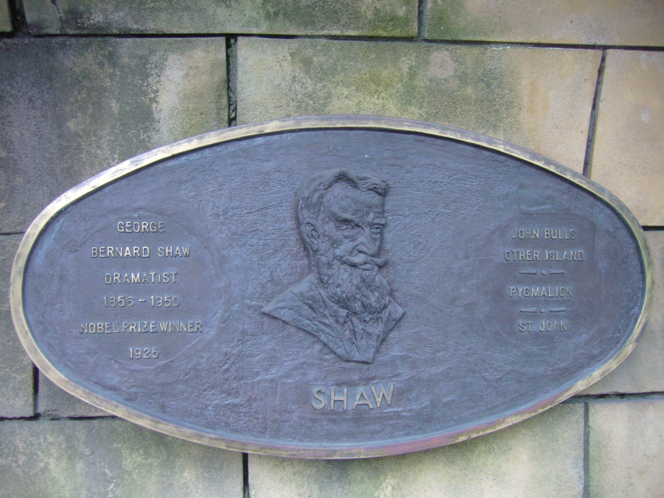 George Bernard Shaw (1856–1950), irischer Dichter; Plakette im Saint Patrick's Park, Dublin, dort angebracht anlässlich der Dublin Millennium 988–1988 Literary Parade